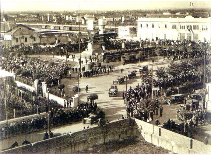 Inaugurazione del monumento a Enrico Dell'Acqua a Busto Arsizio alla presenza del ministro delle Corporazioni Giuseppe Bottai (1929).